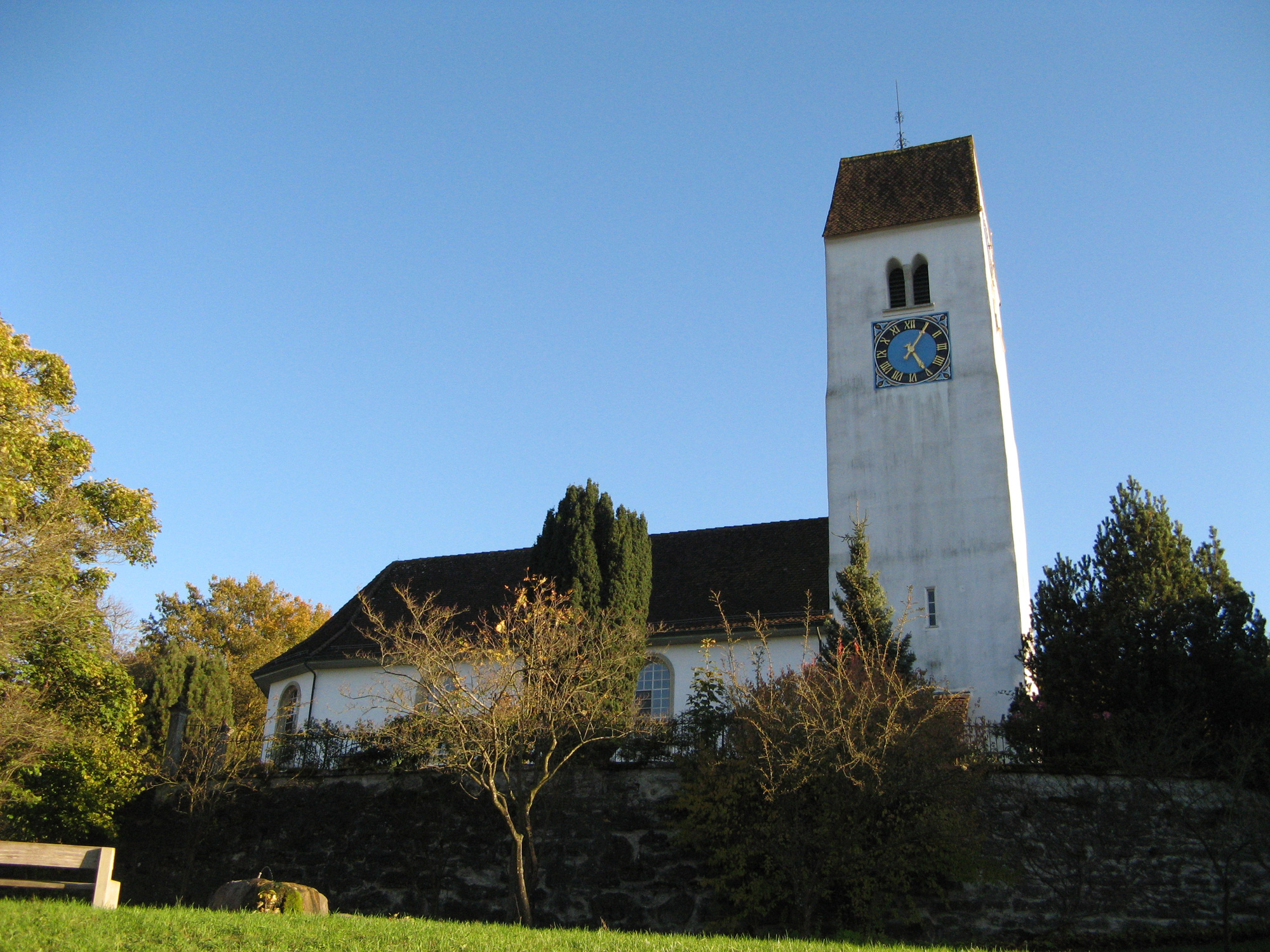 Reformierte Kirche Ammerswil